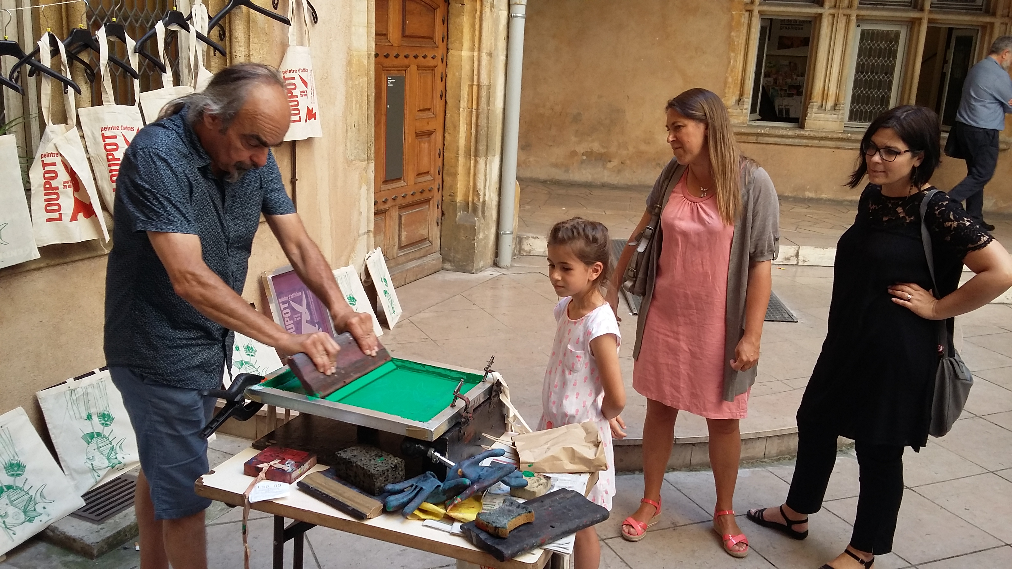 Démonstration de sérigraphie avec PapyArt dans la cour du musée